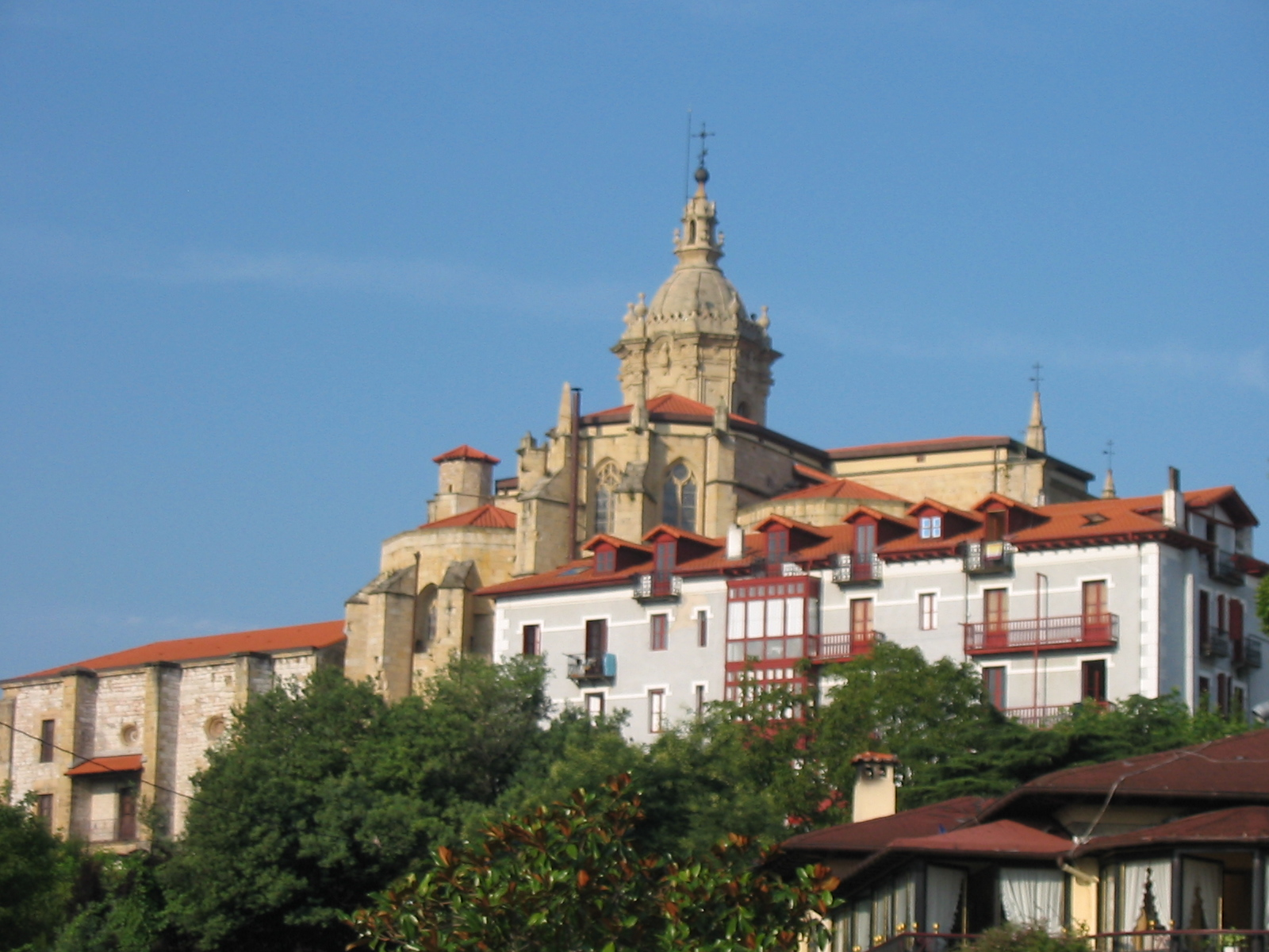 La vieille ville fortifiée de Fontarabie (Pays basque espagnol). Je suis l'auteur du cliché pris en août 2006